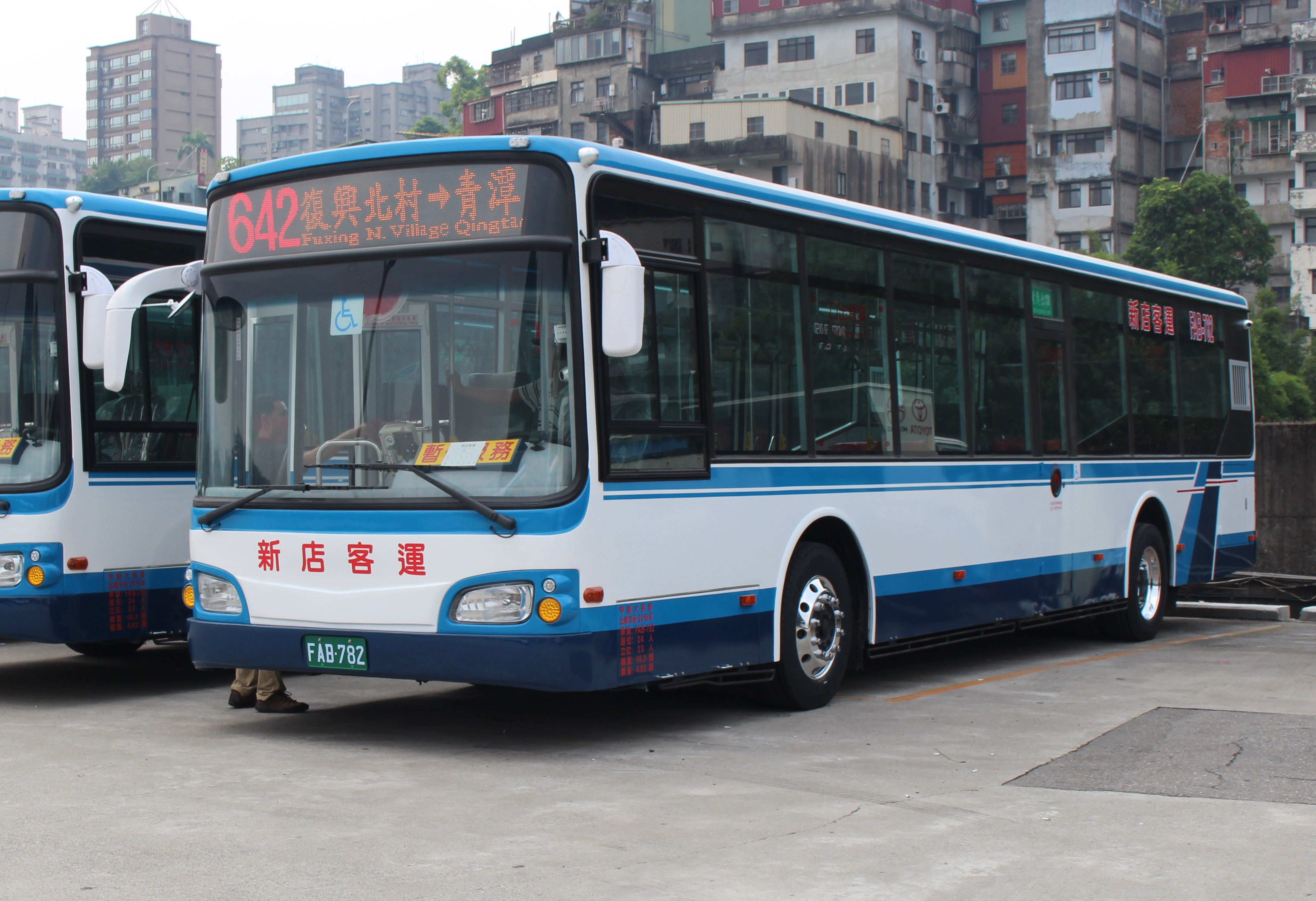 新店客運2016年日野HS8JRVL-UTF低地板公車FAB-782。